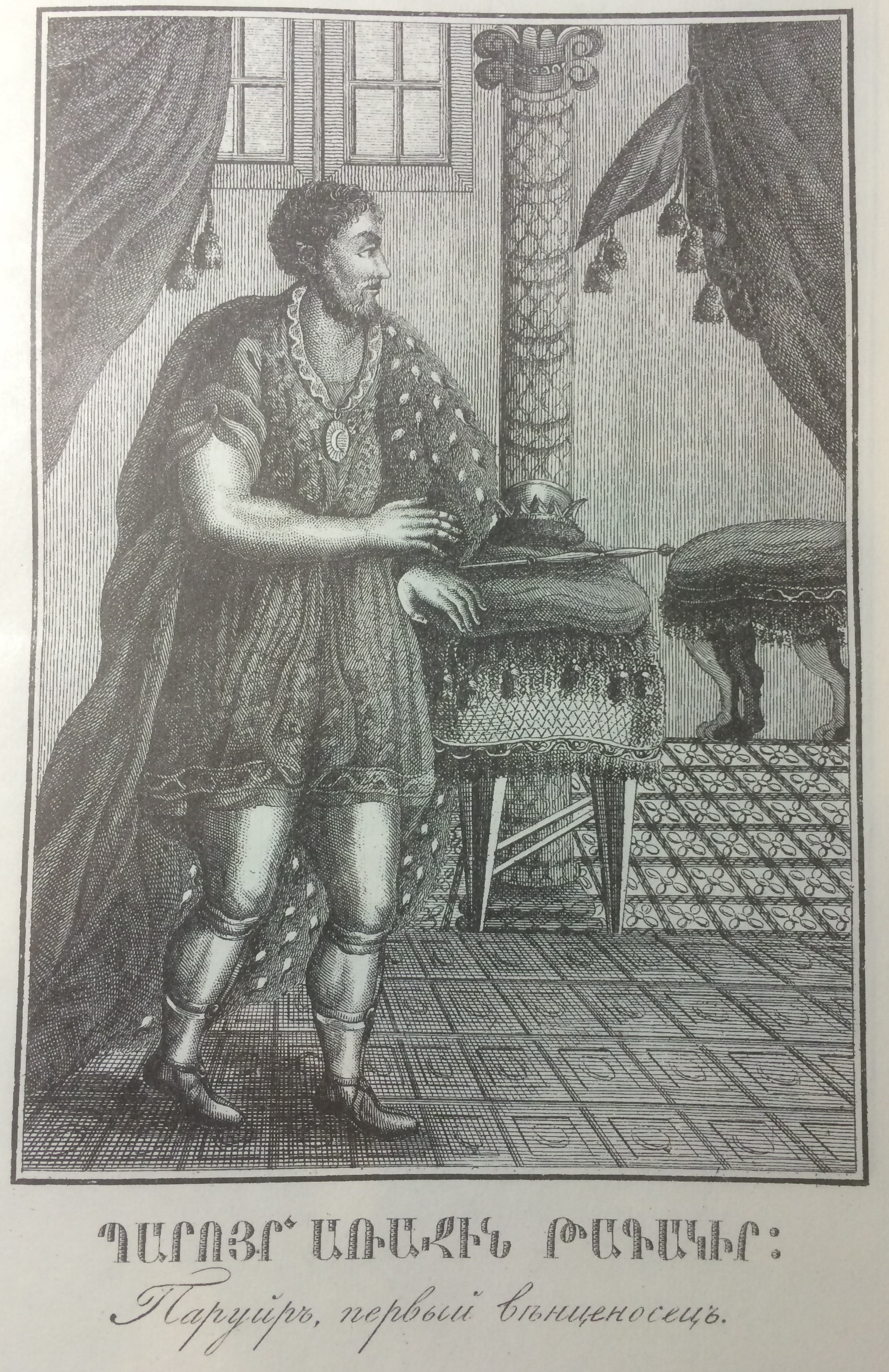 Պարույր Սկայորդի